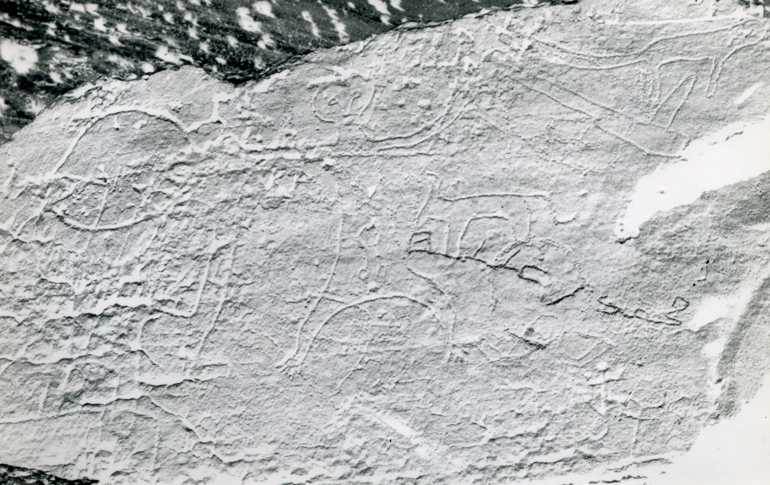 gravure préhistorique du Sud-oranais (Algérie)